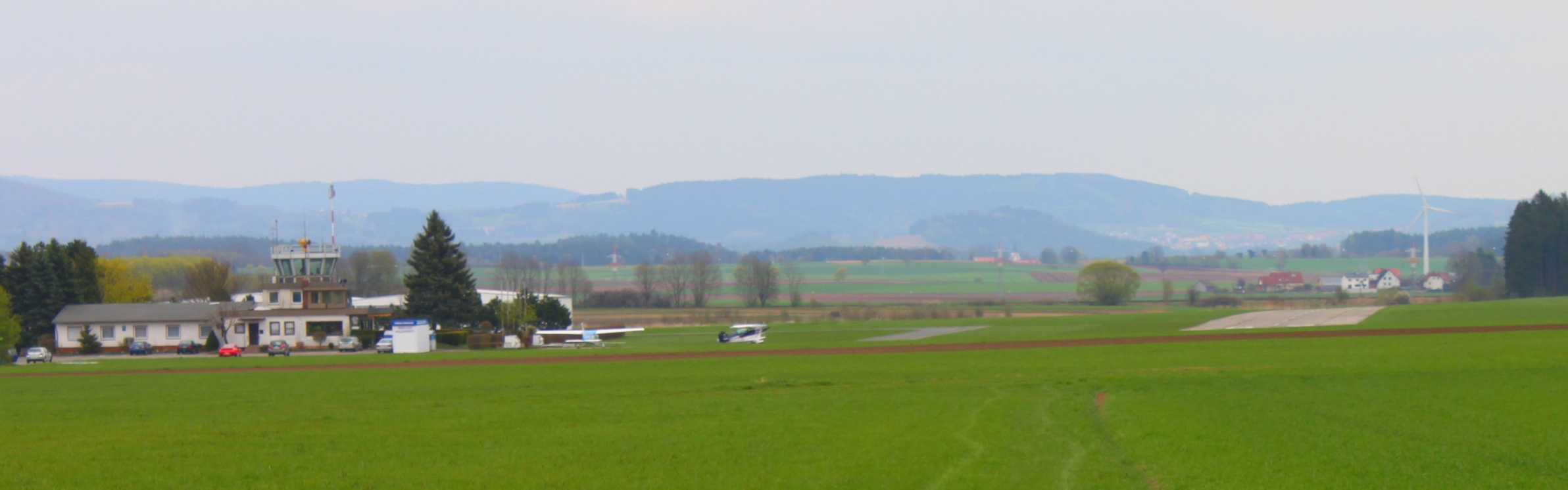 Rosenthal-Airfield EDQP, auch Flugplatz Speichersdorf genannt